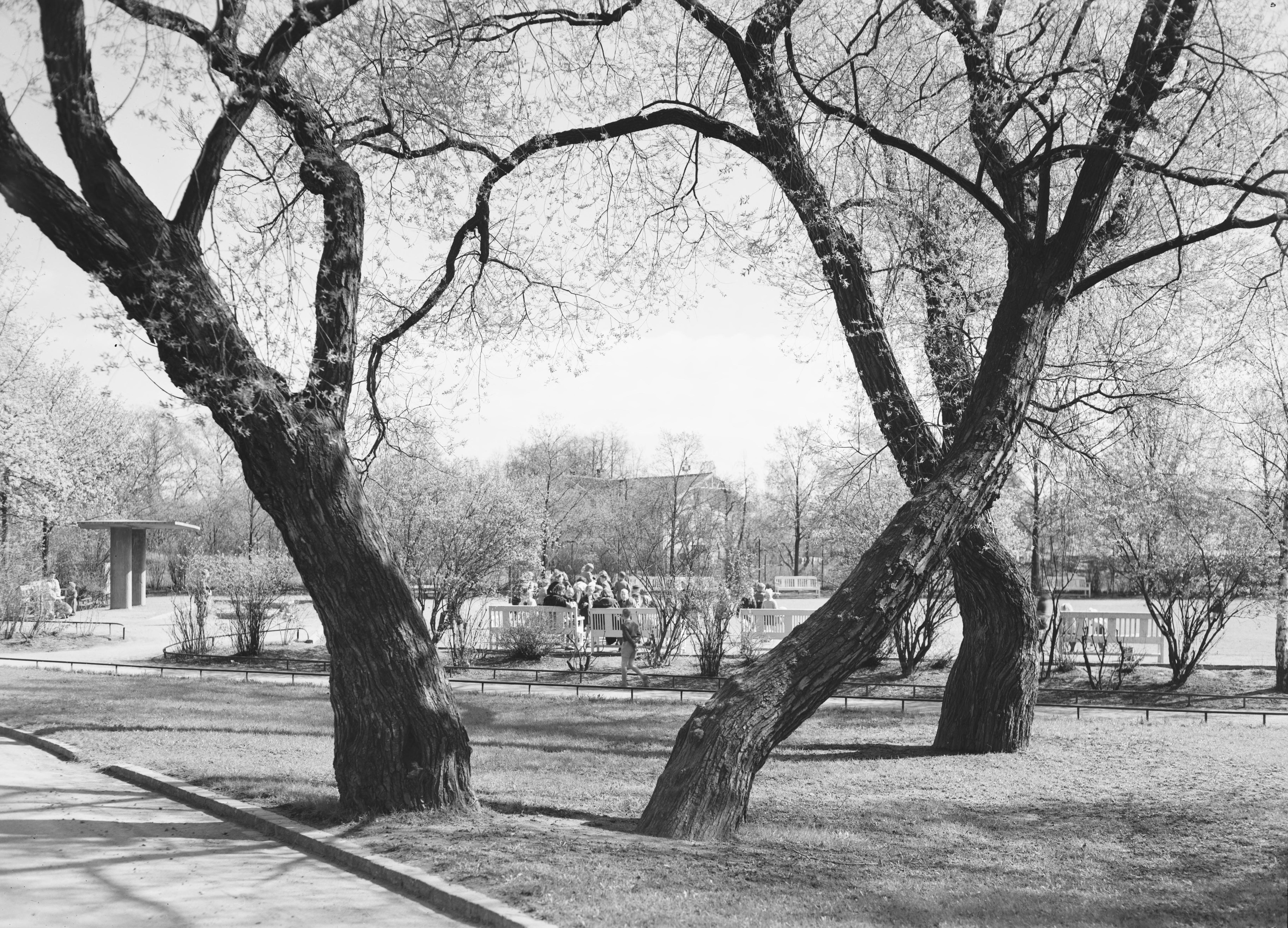 Bildet er hentet fra Nasjonalbibliotekets bildesamling. Anmerkninger til bildet var: Fotograf ukjent Kampen,Oslo, Oslo, Oslo